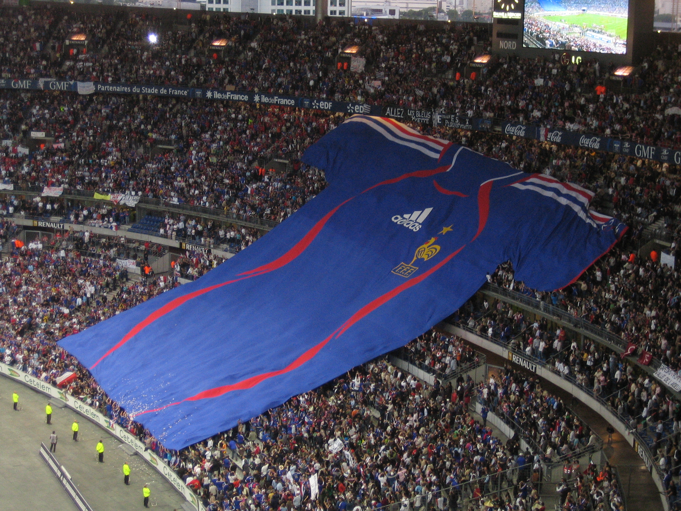 Match amical France-Mexique (1-0), Stade de France, 27 mai 2006